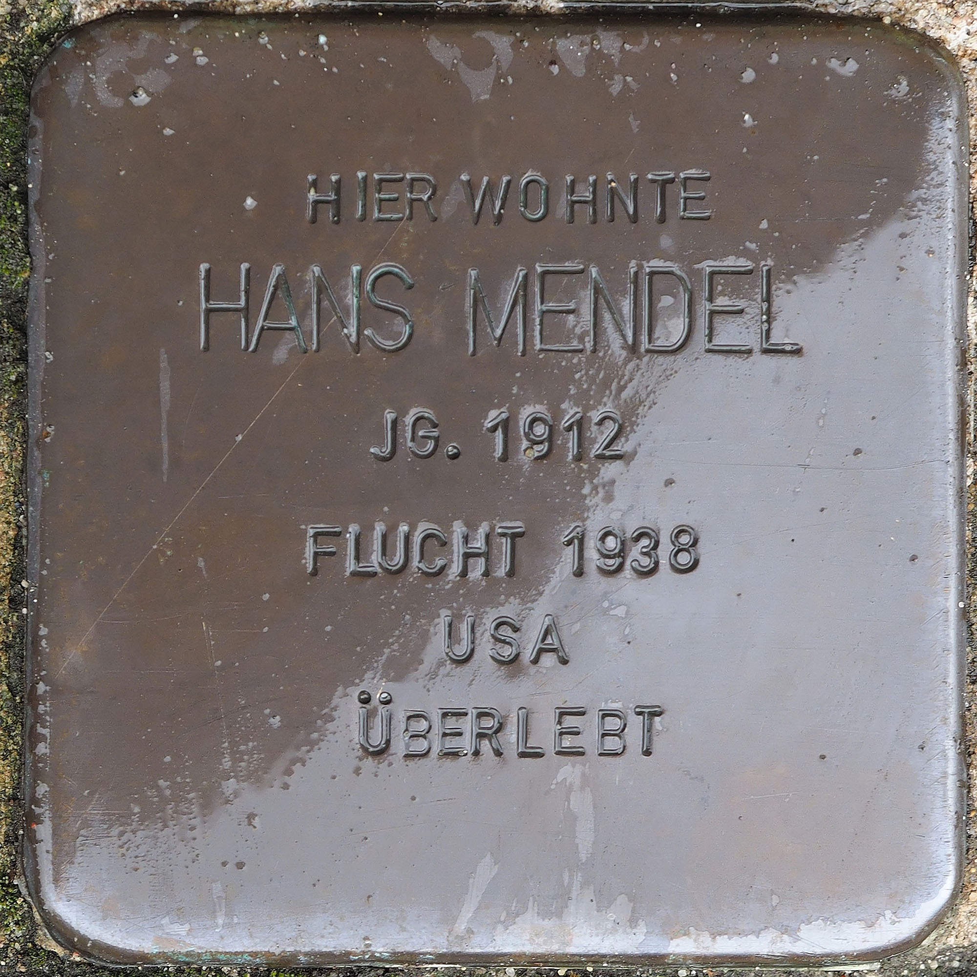 Stolpersteine Straelen: Mendel, Hans